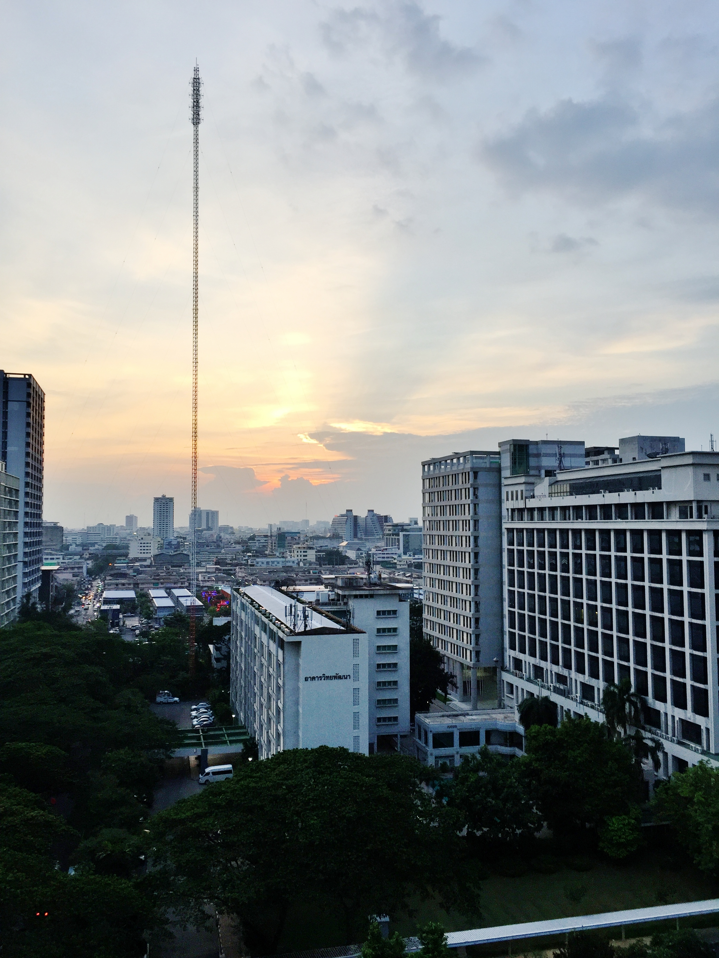 อาคารวิทยพัฒนา(กลาง) เป็นที่ตั้งของสถานีวิทยุกระจายเสียงแห่งจุฬาลงกรณ์มหาวิทยาลัย มีเสาส่งสัญญาณตั้งอยู่ด้านหลังอาคาร(กลาง-หลัง)